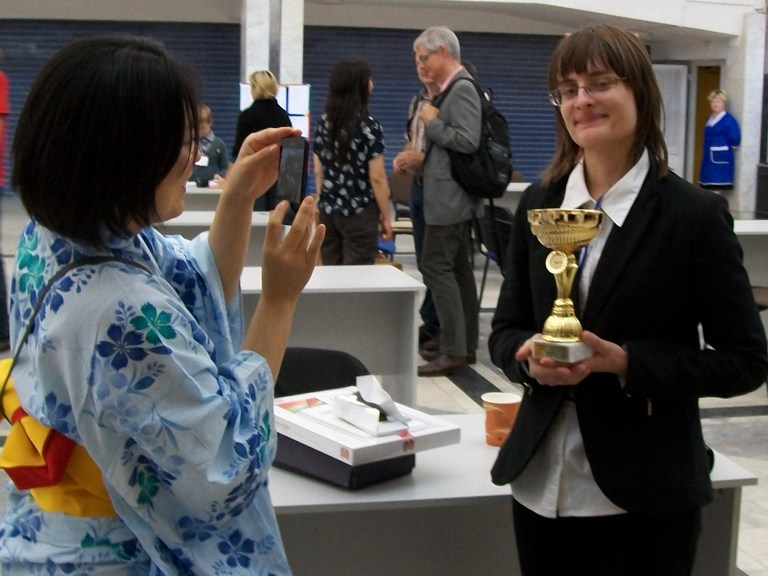 получила награду за лучший результат среди женщин